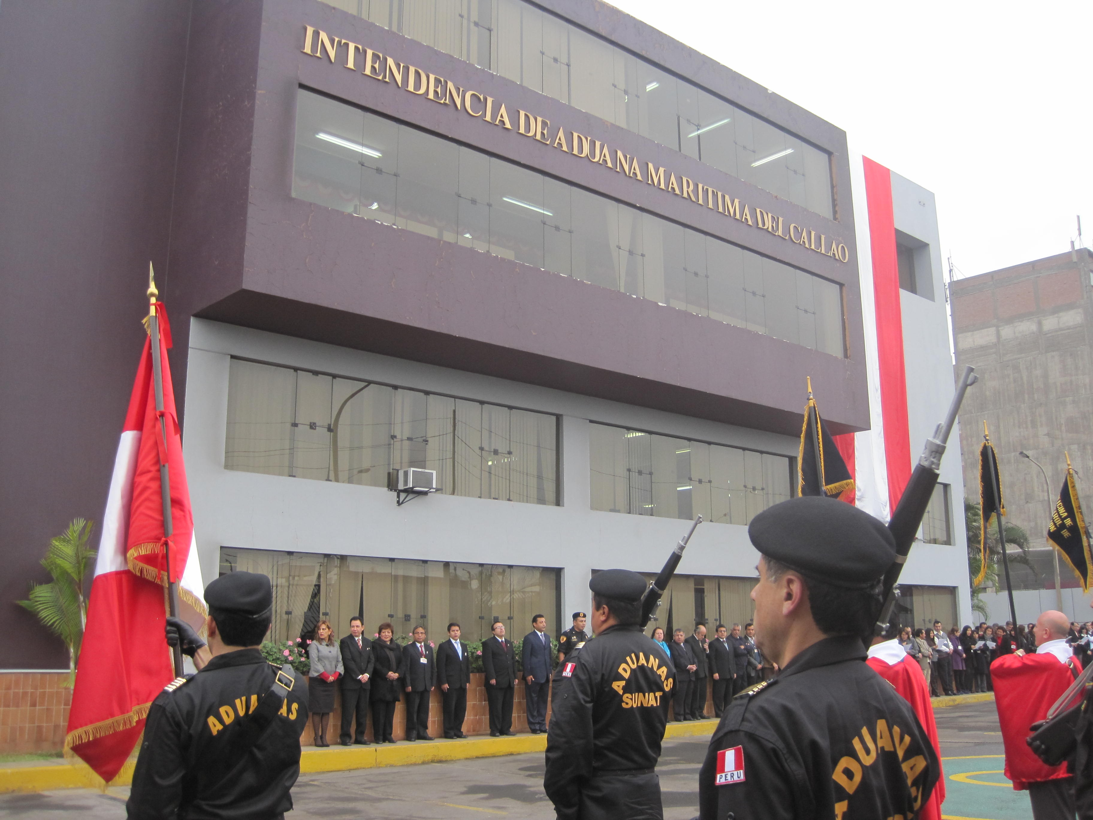 Ceremonia en la Aduana Marítima del Callao, la mas grande del Perù